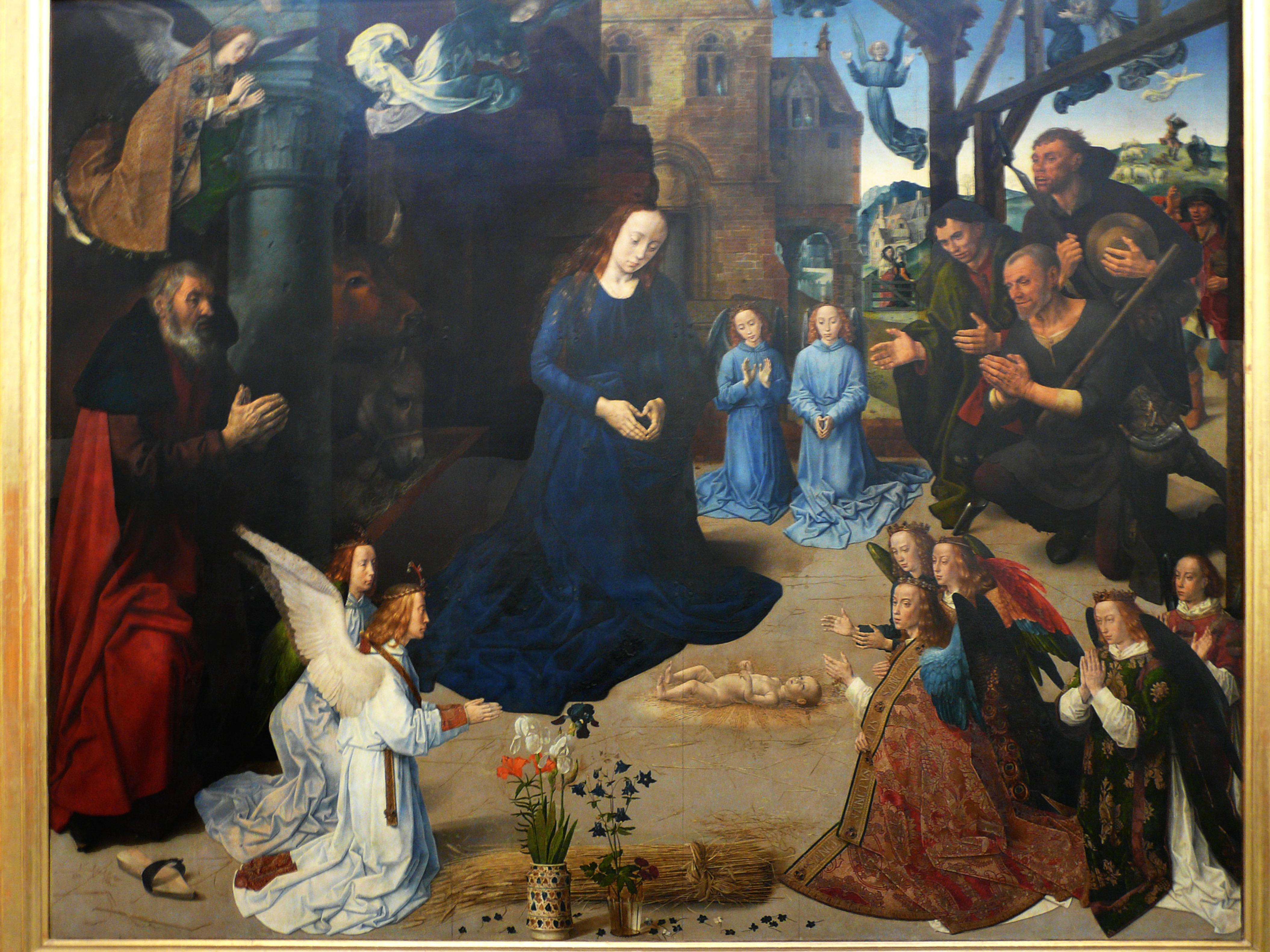 Хуго Ван дер Гус. Триптих Портинари (фрагмент)